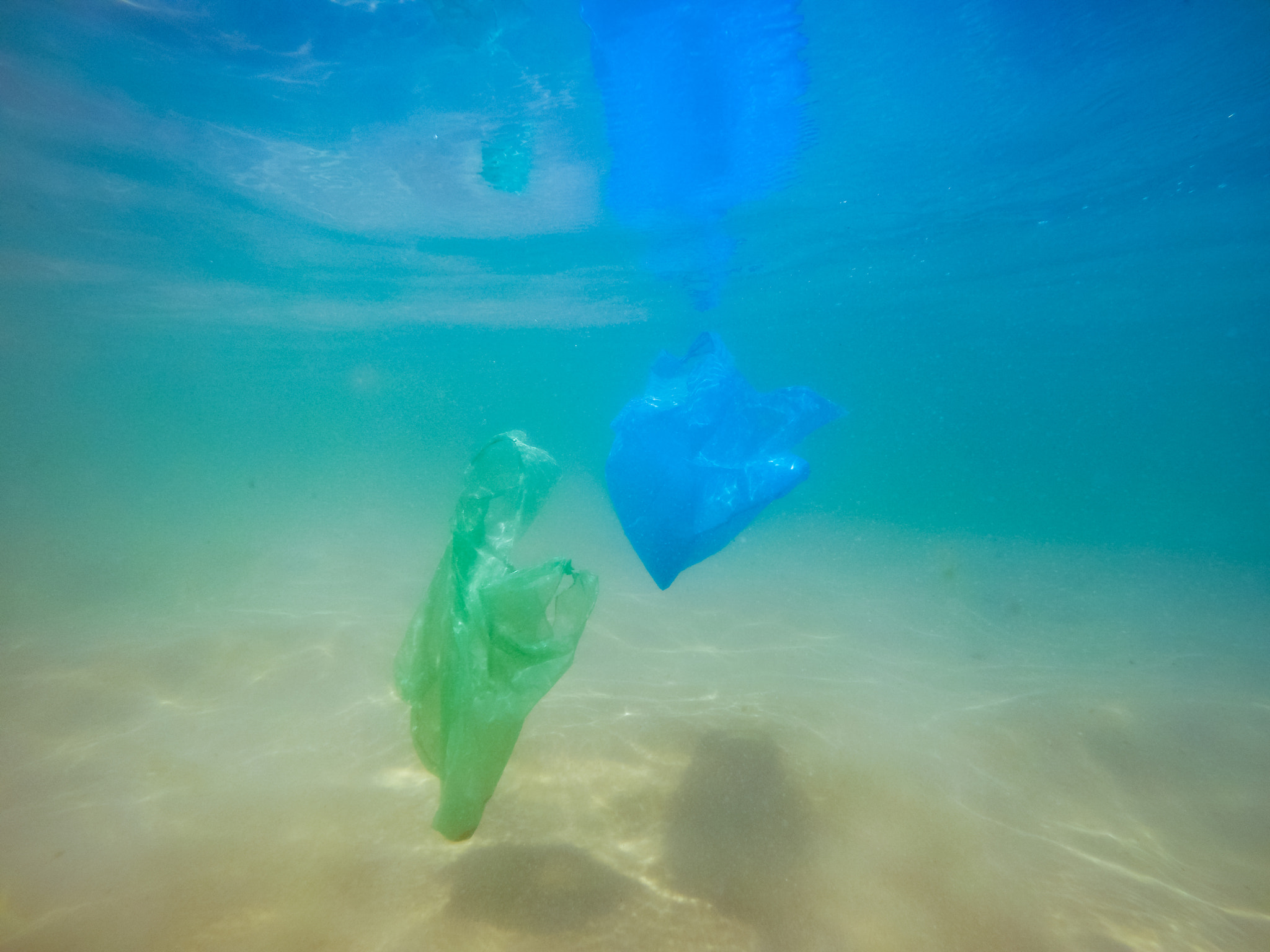 500px provided description: Plastikt?ten verschmutzen die Weltmeere. [#plastic ,#environment ,#bags ,#umwelt ,#plasticbags ,#umweltverschmutzung ,#plastikt?ten ,#plastikm?ll]